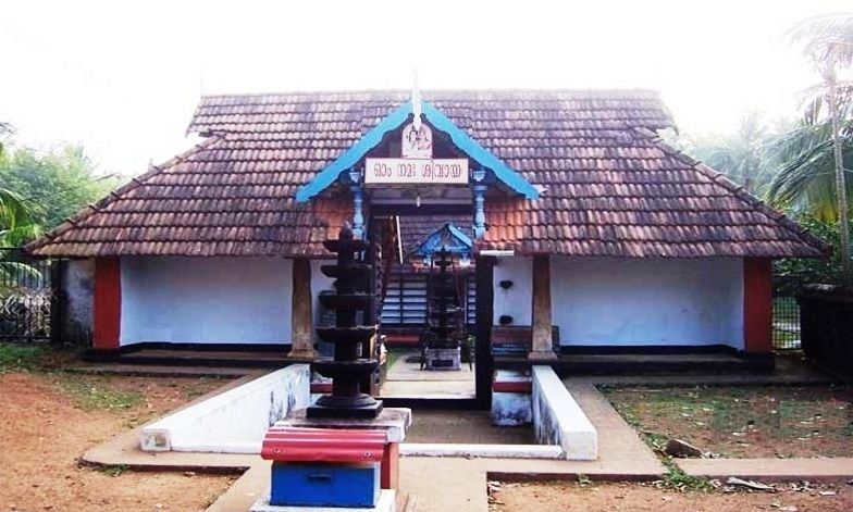 മുണ്ടൂർ ശിവക്ഷേത്രം